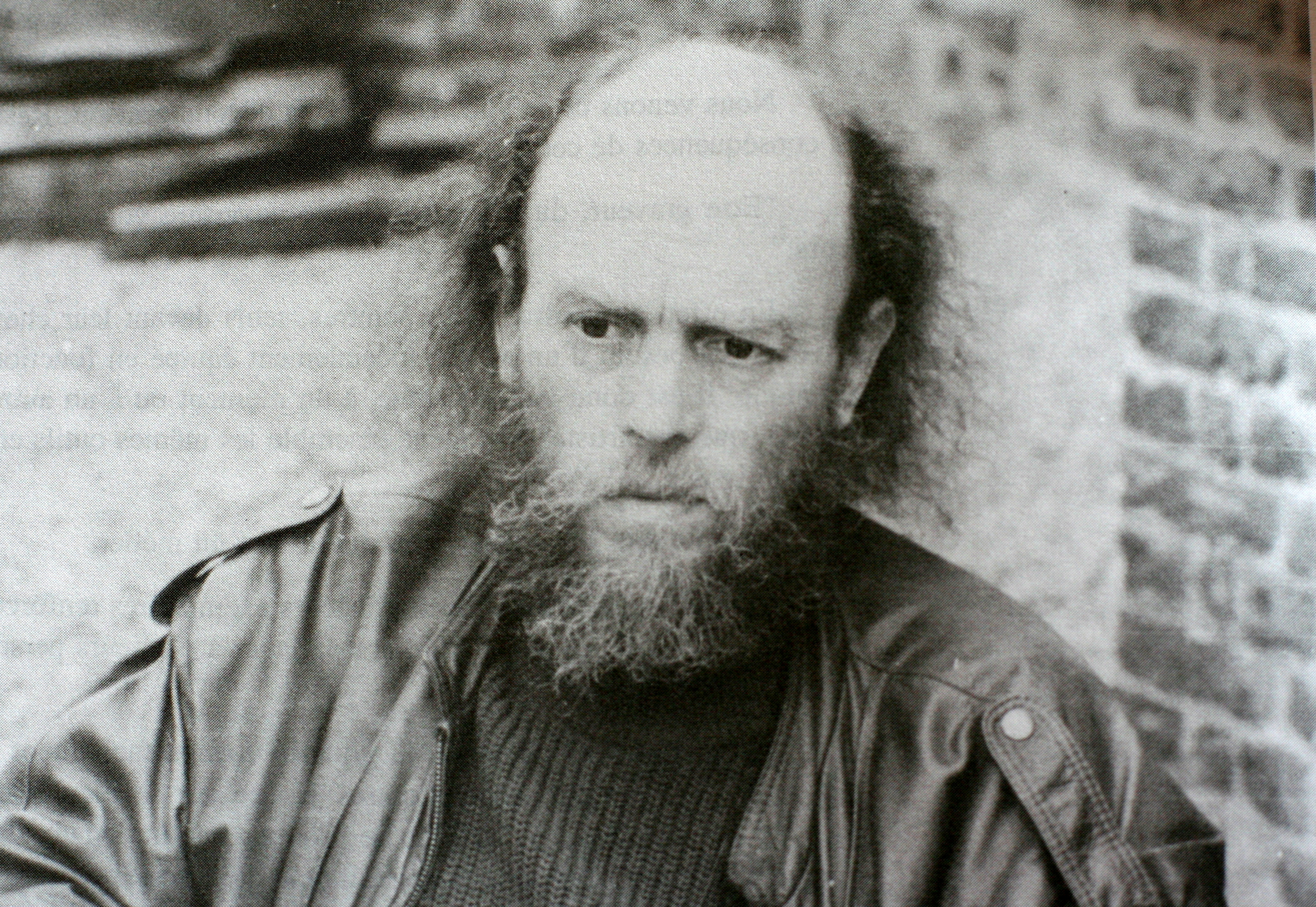 Portrait de Dacos. Collection particulière de Dacos. Années 1980.